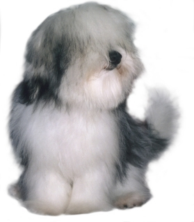 Tino du Castel de la Roche aux Fées, un coton de Tulear né le 26 mars 2002.